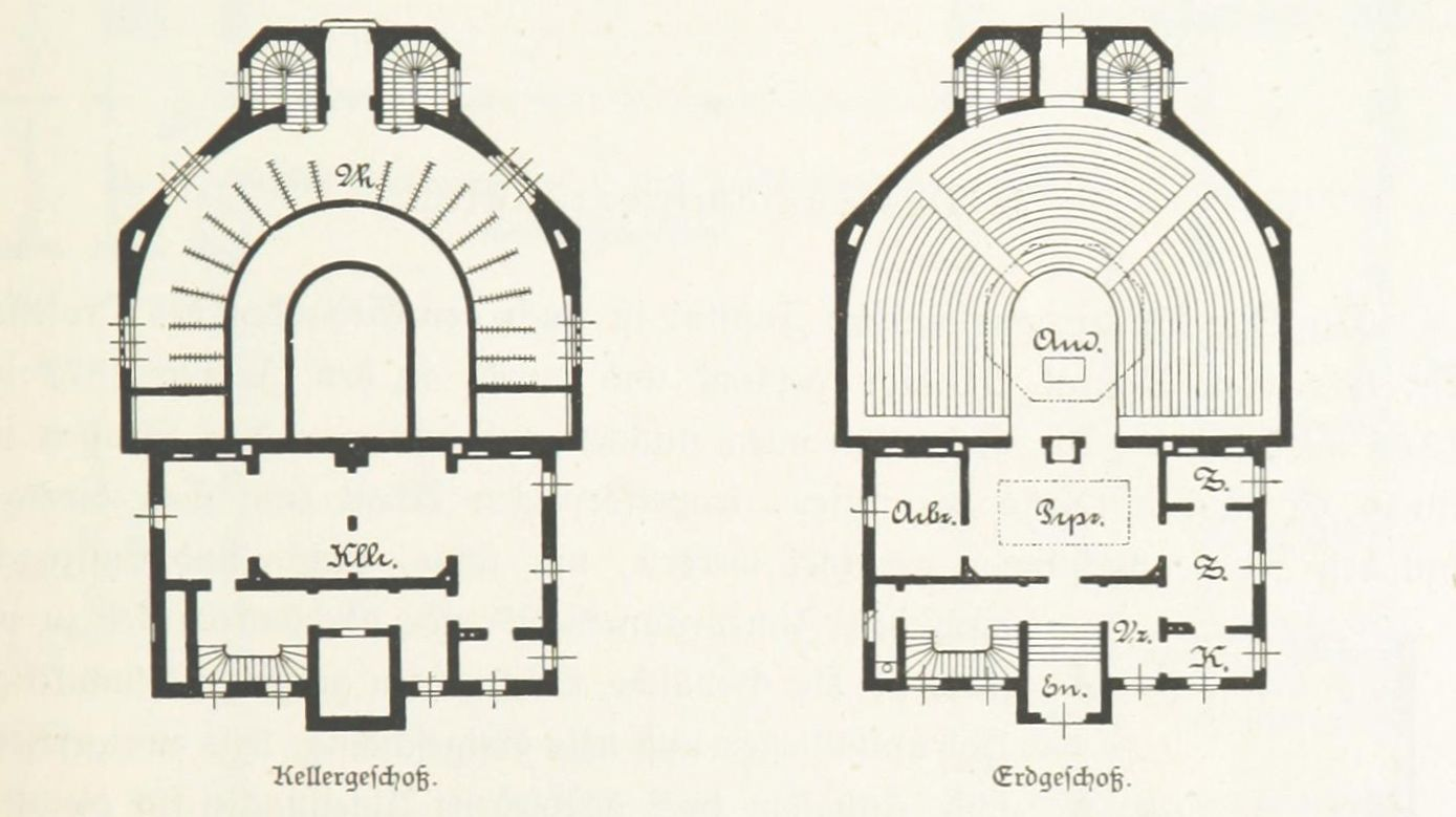 das Physiologische Spectatorium, ein Hörsaal für wissenschaftliche und populärwissenschaftliche Präsentationen des österreichischen Privatgelehrten und Physiologen Johann Nepomuk Czermak, erbaut 1870 nach dem Muster der Royal School of Mines in London Grundriss EG und OG